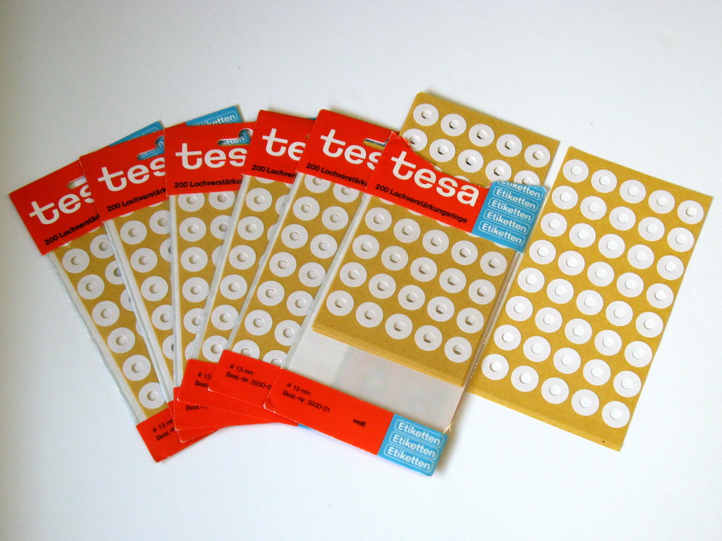 Lochringverstärker zum Aufkleben. Hersteller Beiersdorf, Produktlinie Tesa.Durchmesser 13mm, Best.-Nr. 5930-01weiß